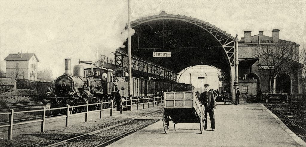 Vue sur les voies et la marquise de l'ancienne gare de Sarrebourg, Moselle, France, désaffectée en 1923 et démolie en 1938.